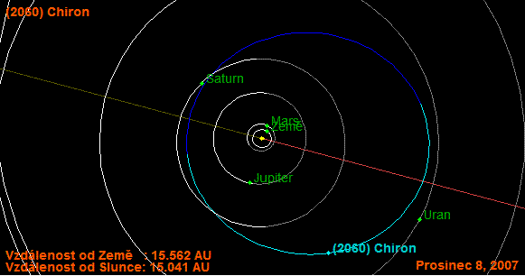 Oběžná dráha planetky Chiron